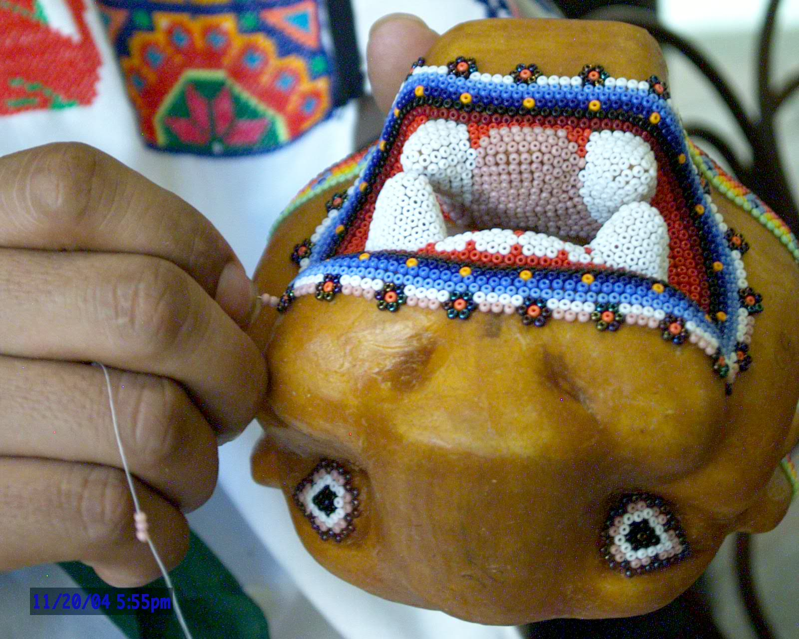 Huichol Trabajando, 20 Dic 2004 by Mario Jareda Beivide, Fotografias de Mexico